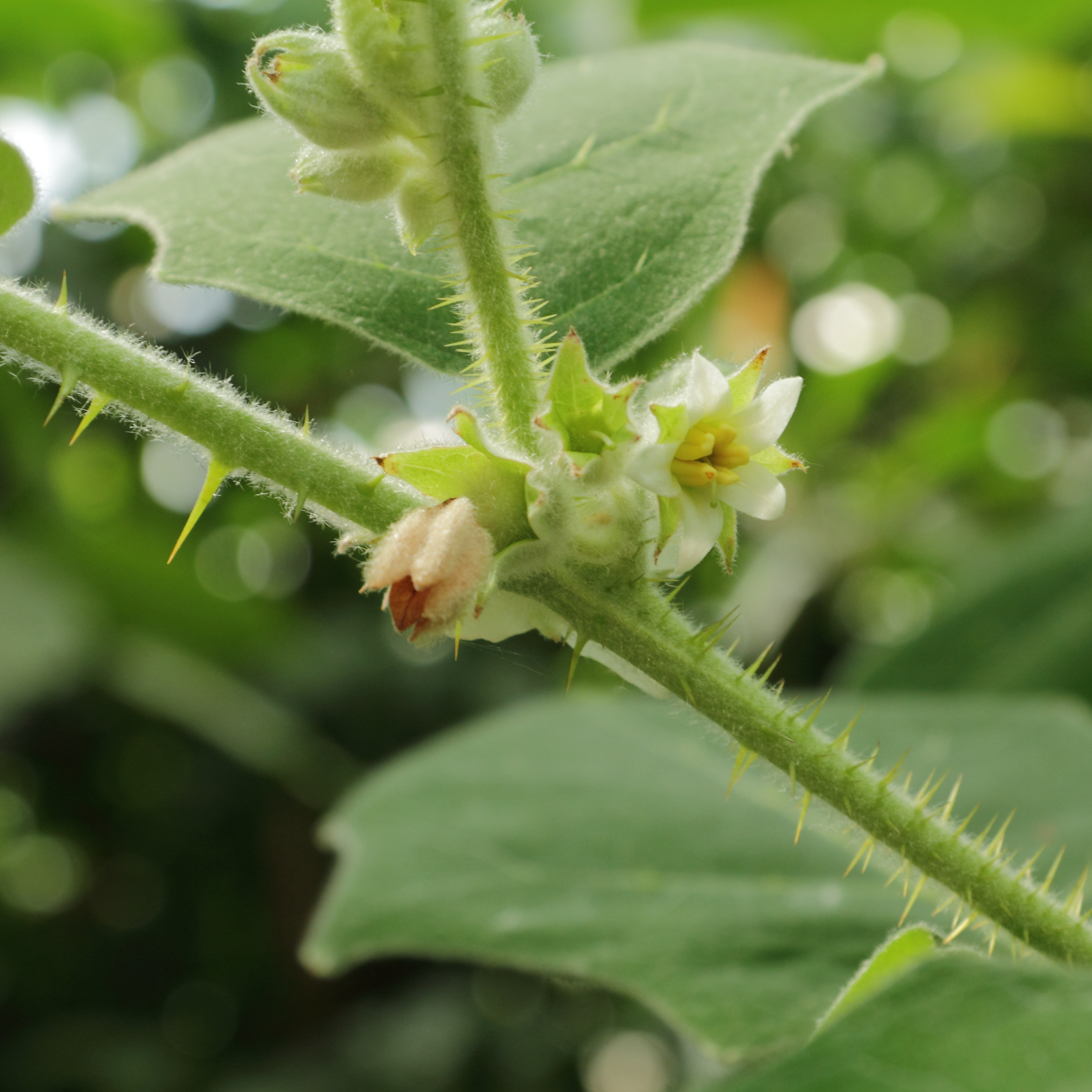 Solanum quitoense , identifierad med hjälp av befintlig skylt vid Bergianska trädgården.